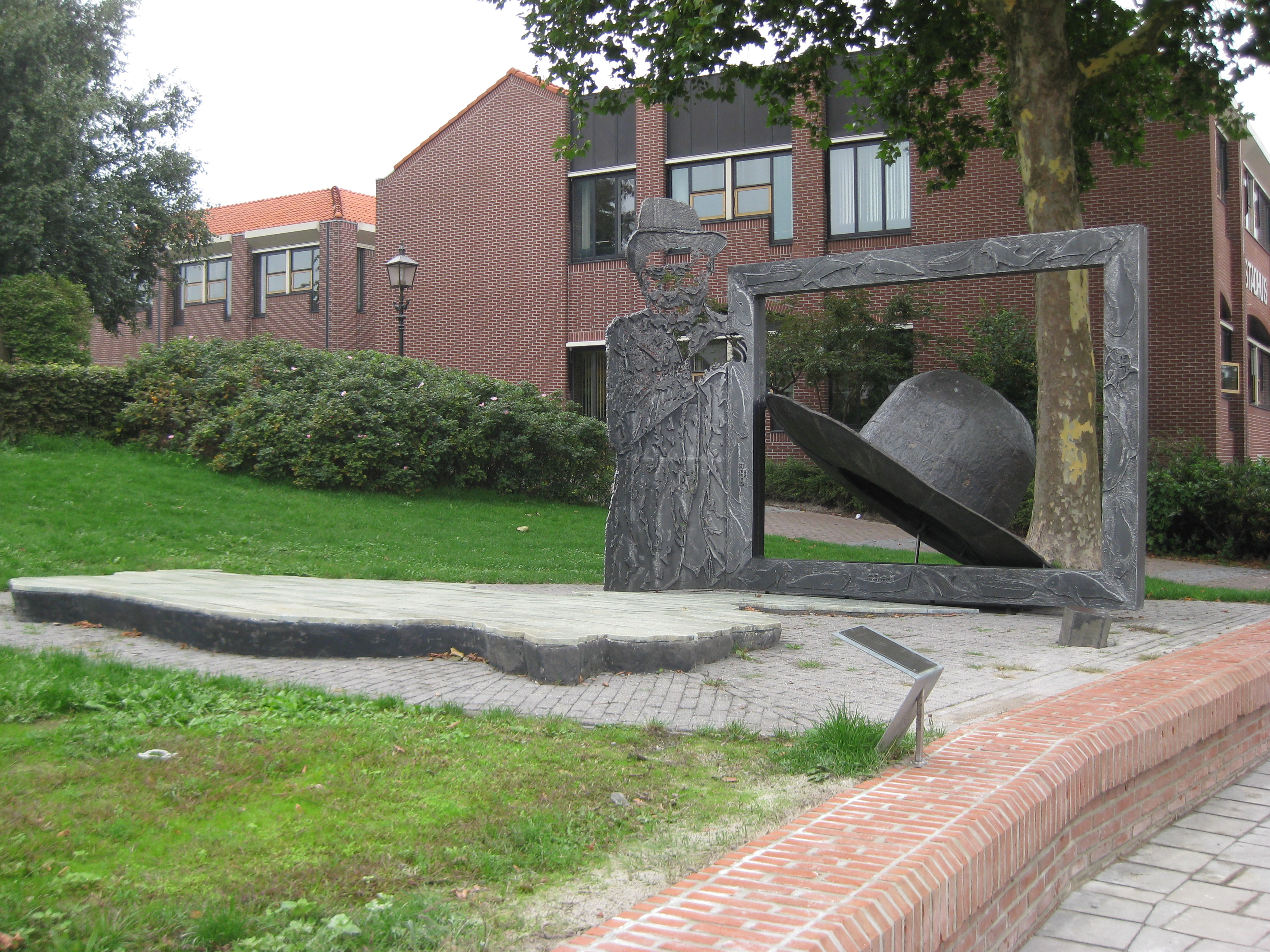 Zuiderzeegezicht gebaseerd op Eibert den Herder. Gemaakt i.o.p. Stichting Het Burgerweeshuis n.a.v. 450 jarig bestaan. Kunstenaar Hans Mes, 4 november 2005 Scheepssingel Harderwijk